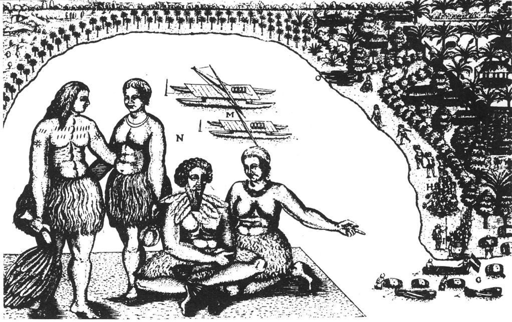 Houtsnede door Isaack Gilsemans uit reisdagboek Abel Tasman (1642-1643, uitbeeldend de kleding, boten en nederzettingen van de bevolking van Tongatapu.